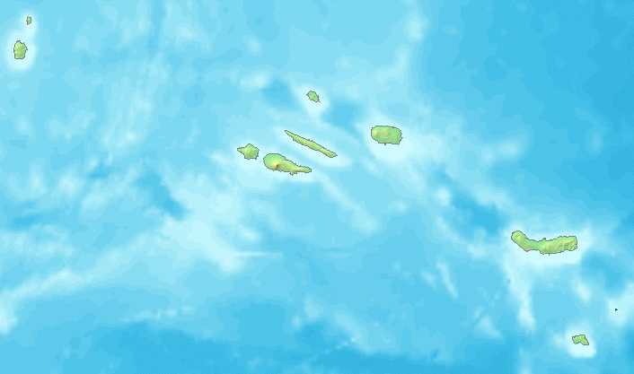 Azoren